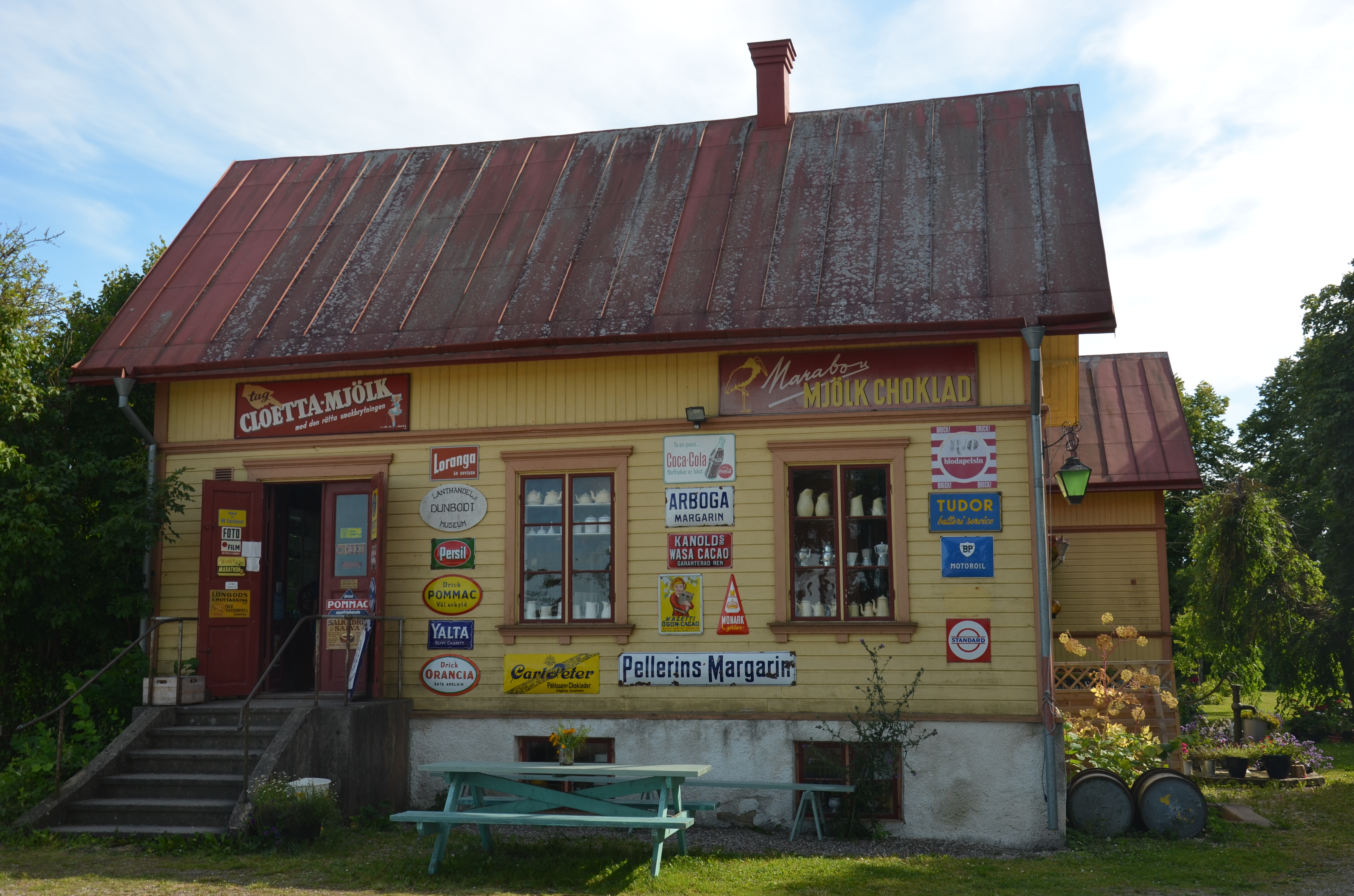 Dune lanthandel, Dalhem. Gotland